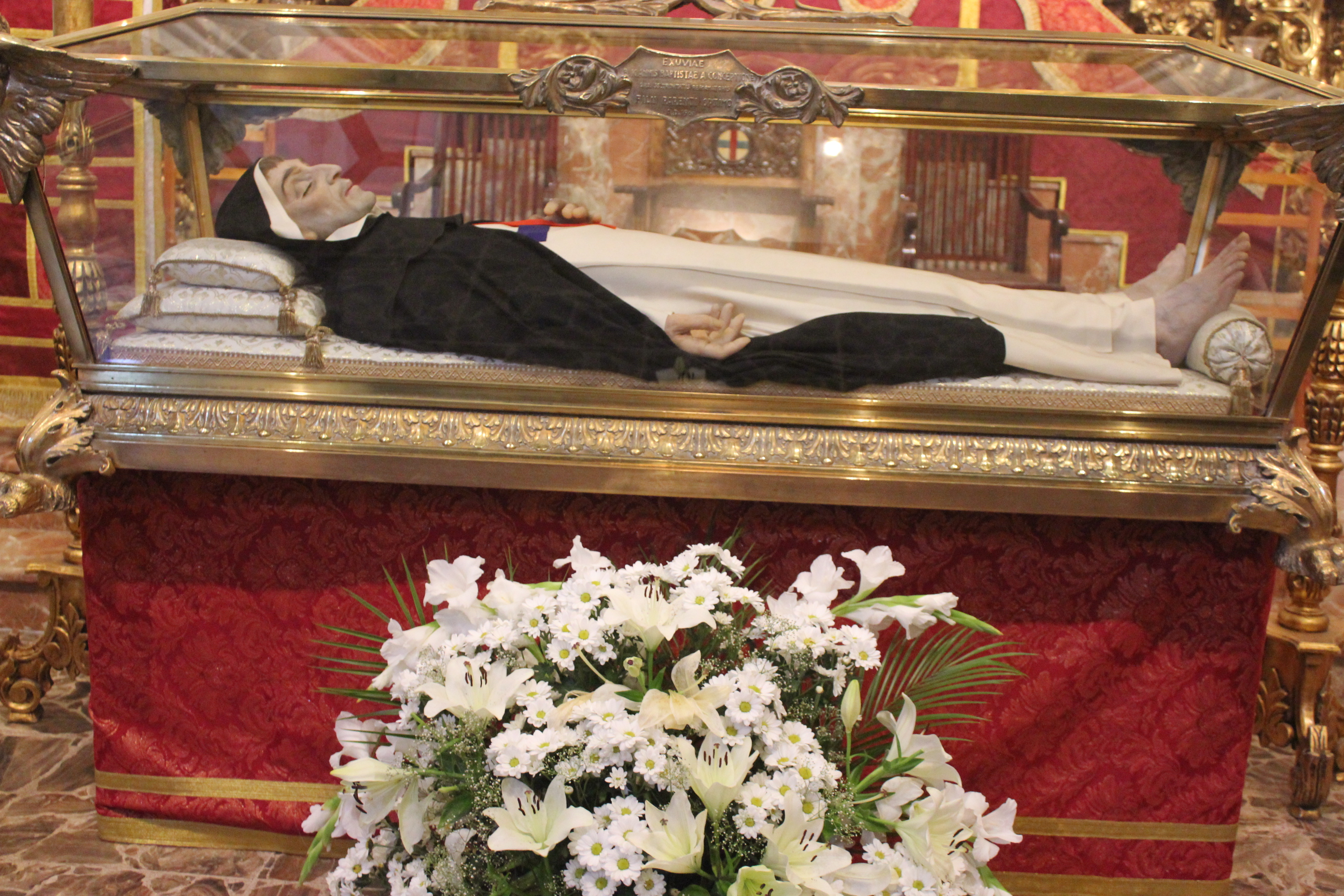 Sepulcre de Sant Joan Baptista de la Concepció, a l'església de Nuestra Señora de Gracia (Còrdova, Andalusia)